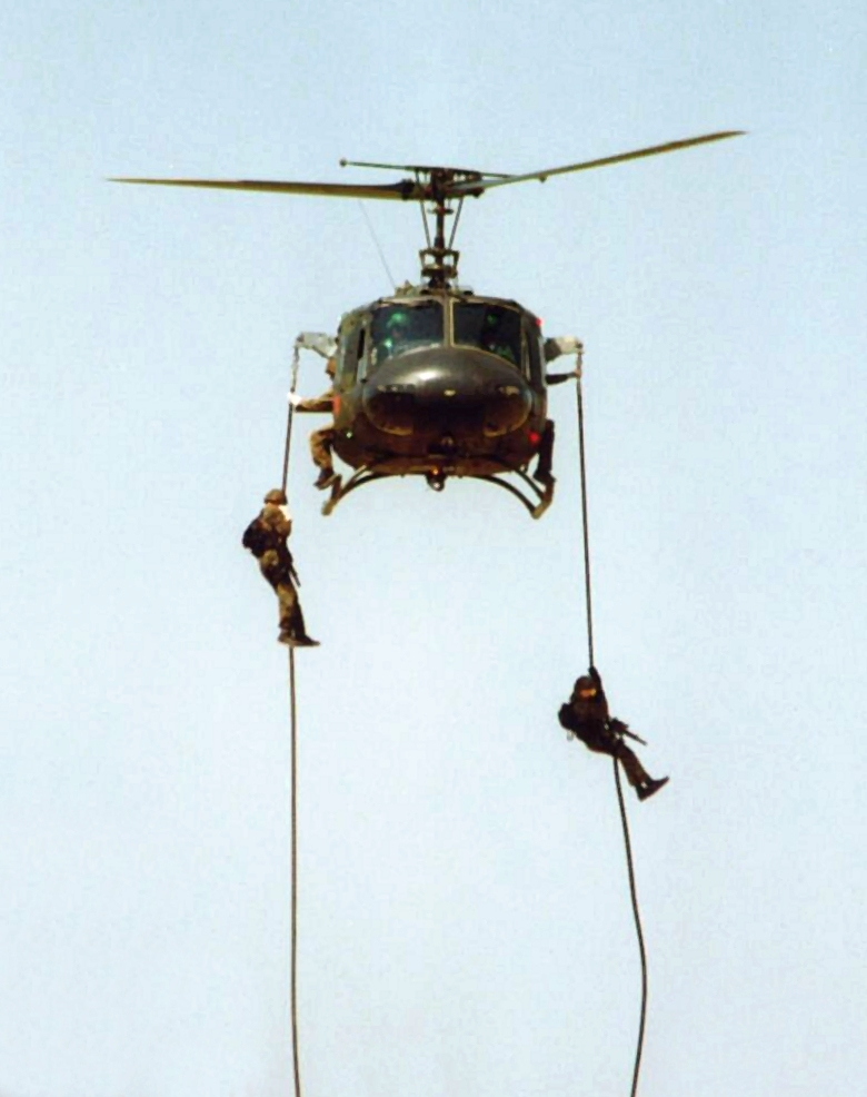 Bundeswehr-Vorführung auf der ILA 2000 in Berlin.